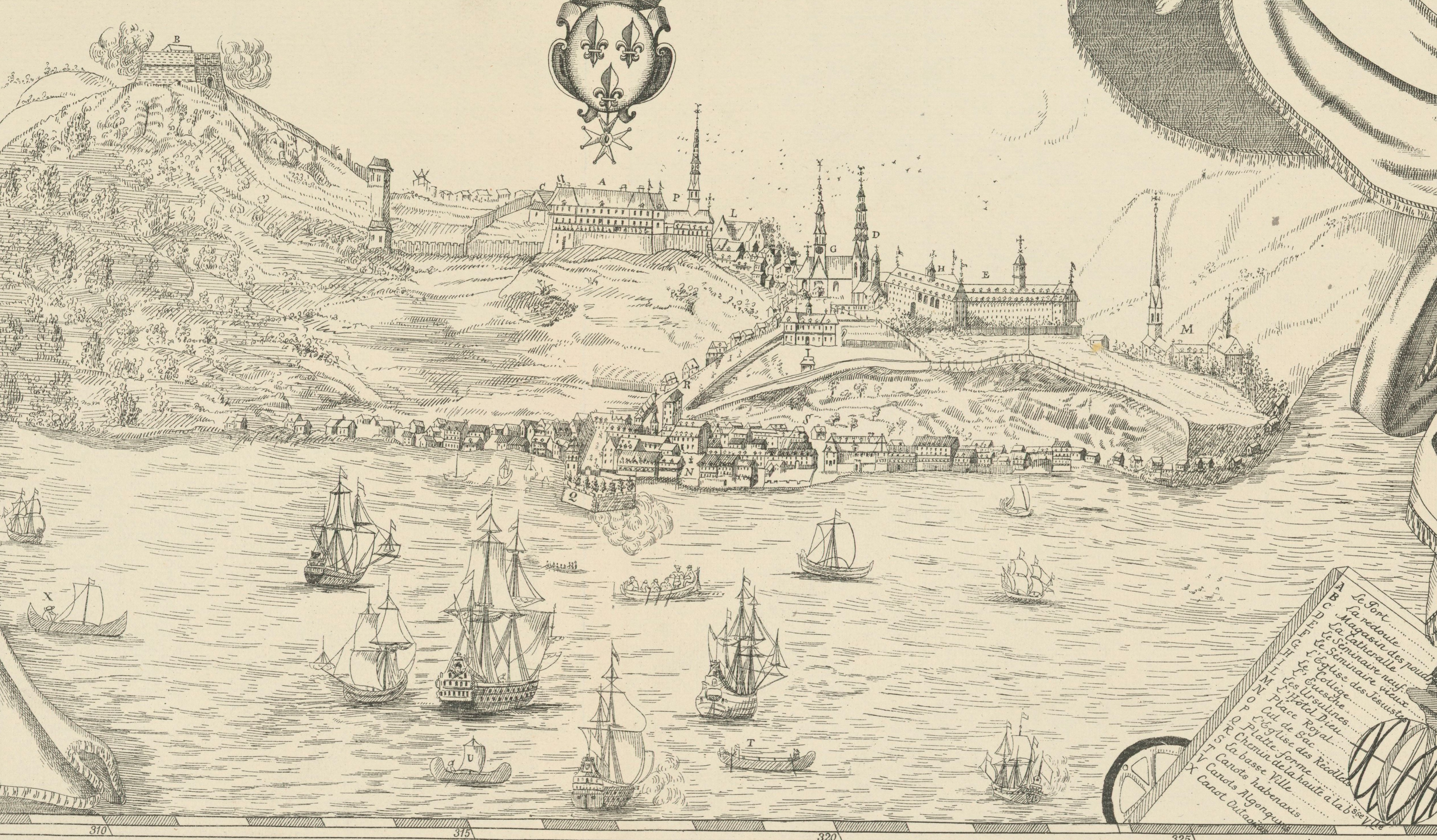 Détail d'un dessin avec légende publié en 1699. Titre exact : Québec vue de l'Est. Taille : 39 x 71 cm. Document du Service hydrographique de la Marine française consacré au Québec.